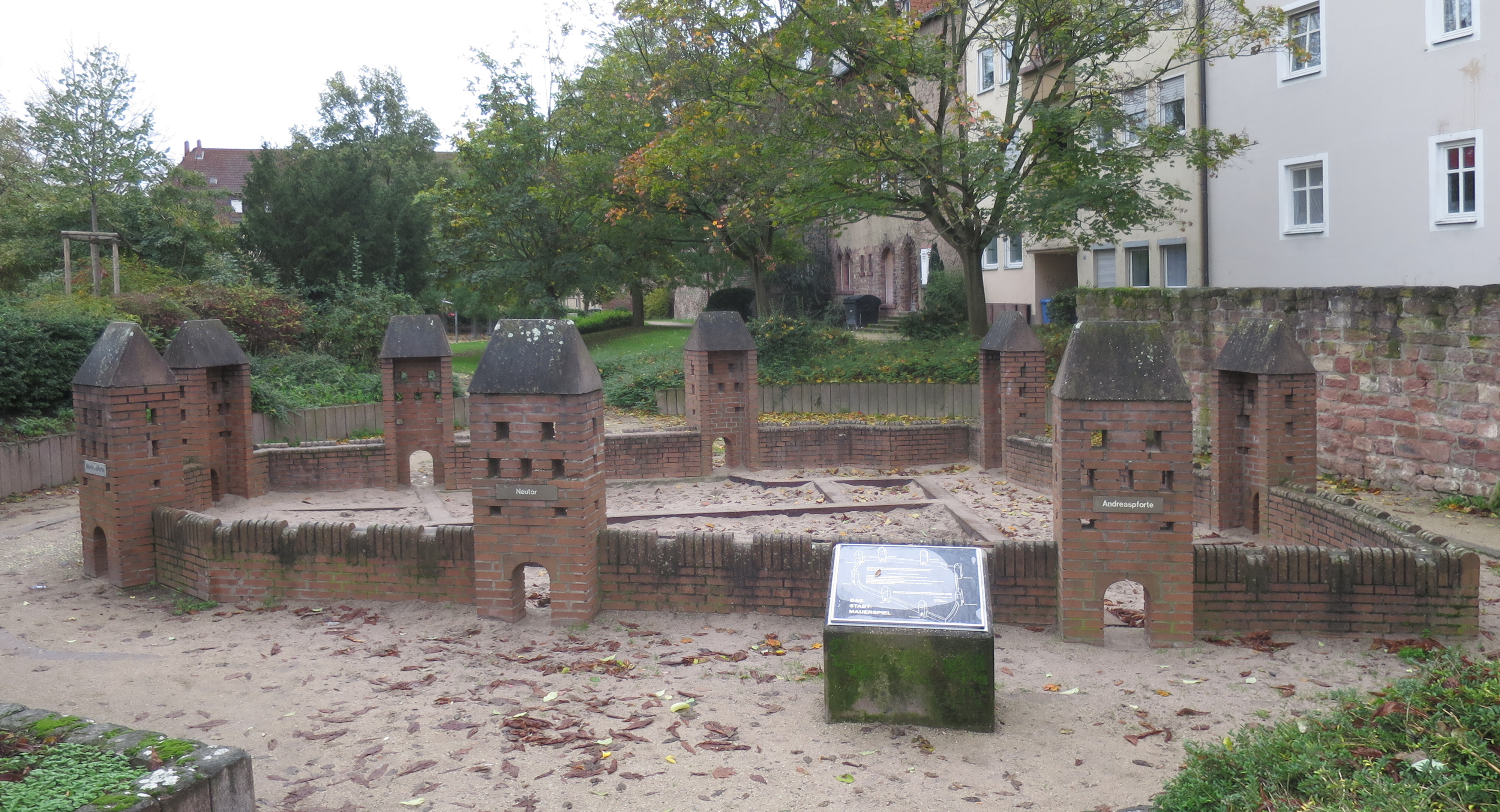 Spielplatz in der Herta-Mansbacher-Anlage mit nachgebauter Stadtmauer mit den 8 Toren